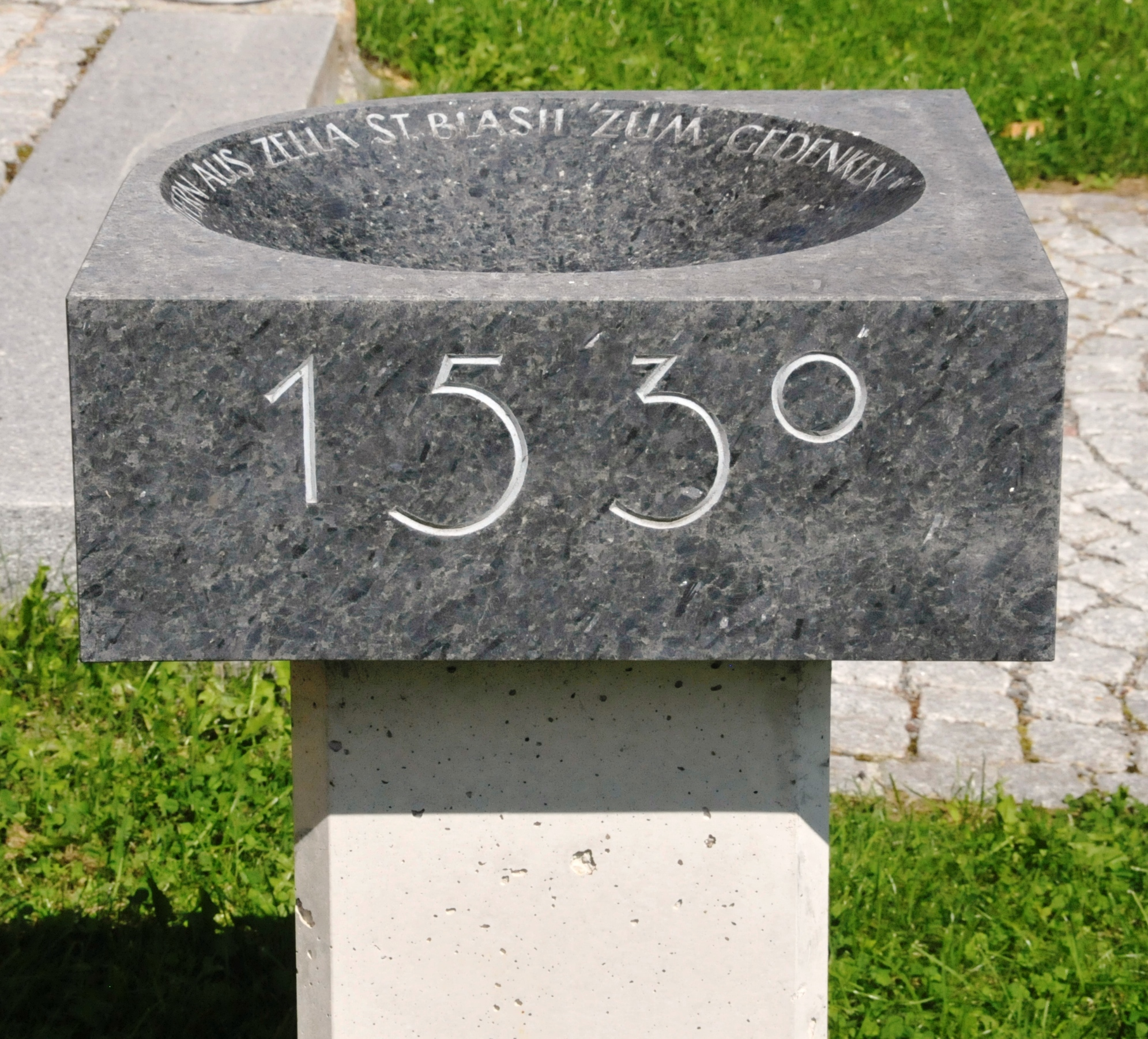 Zella, Kirche St. Blasii, Gedenkstein Täufergemeinde, links vor dem Osteingang der Kirche